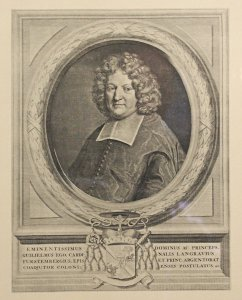 Wilhelm Egon von Fürstenberg, Bischof von Straßburg, Kardinal